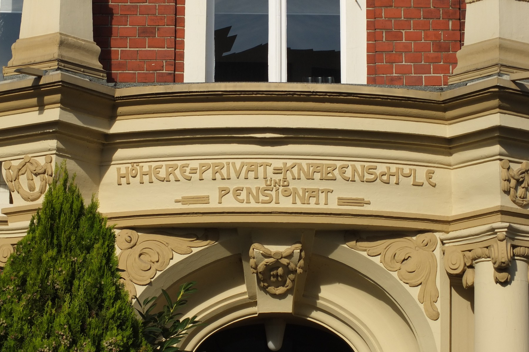 Höhere Privat-Knabenschule und Pensionat, Schulbezeichnung über Eingangstür, Hilden, Kolpingstraße 9-11This is a photograph of an architectural monument.